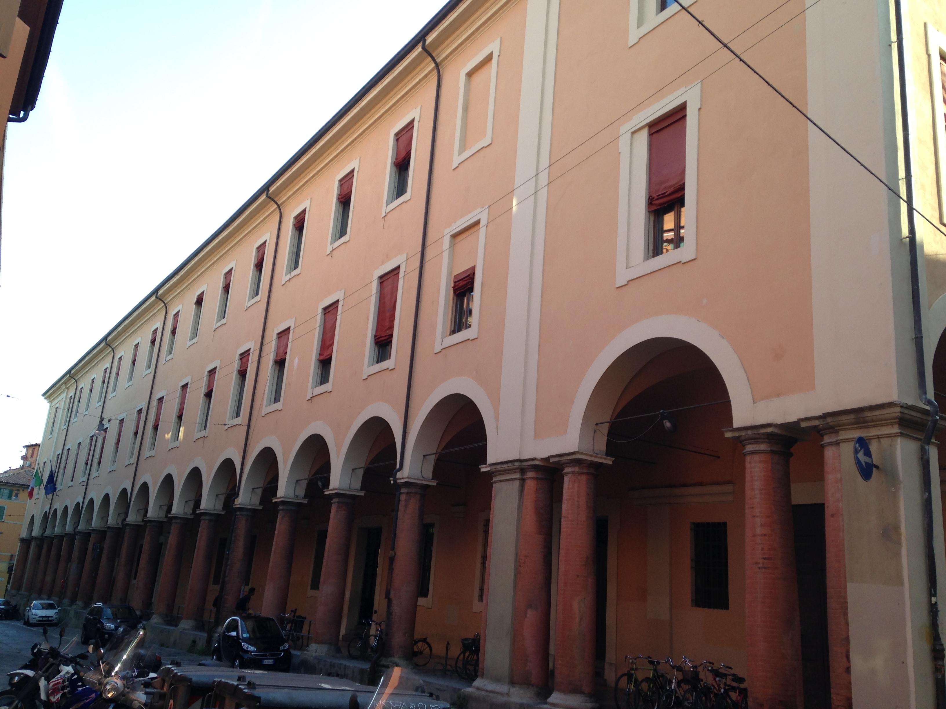 Il liceo ginnasio Luigi Galvani di Bologna, nella mattina del 7 giugno 2014.